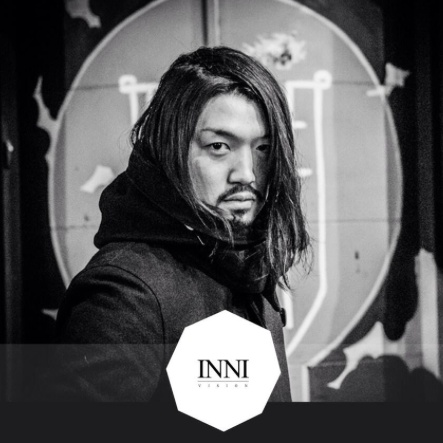 self image